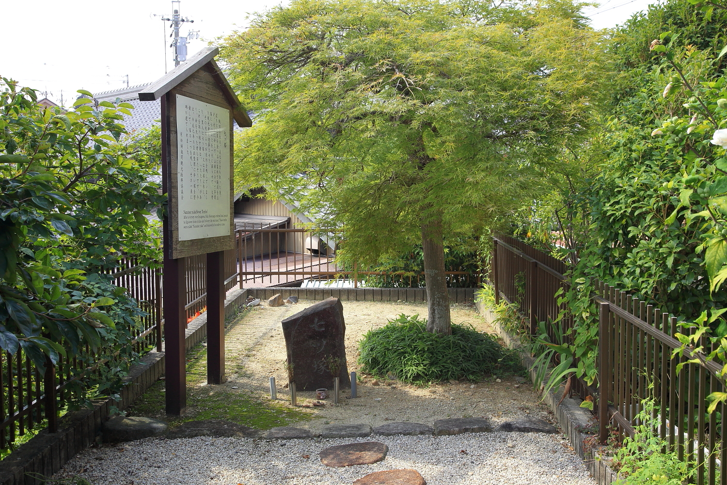 七ツ塚（名古屋市緑区、2012年9月）